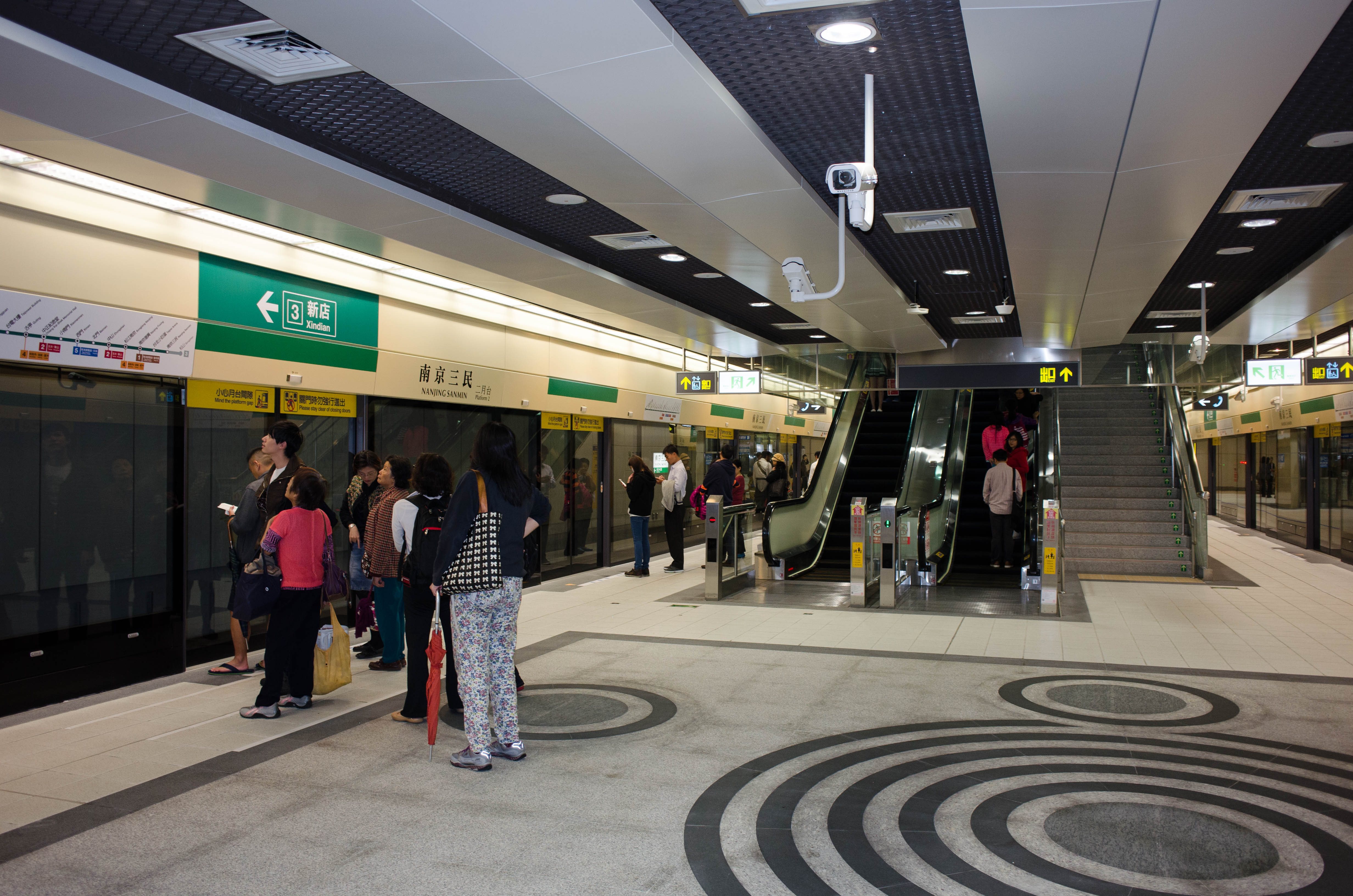 中文（台灣）: 臺北捷運松山線南京三民站月臺，攝於開業日晚間。